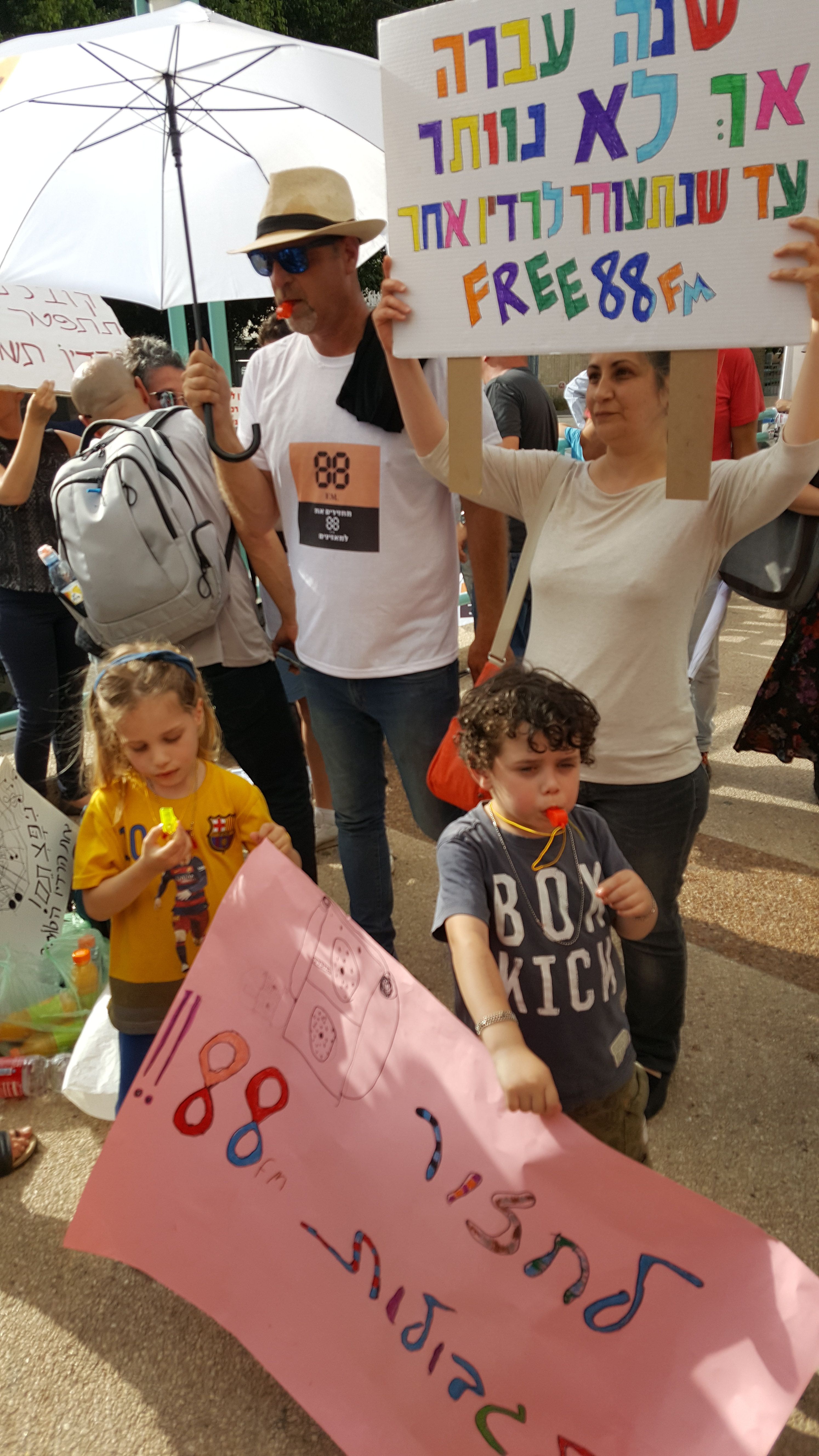 ההפגנה מול משרדי התאגיד 3 במאי 2018